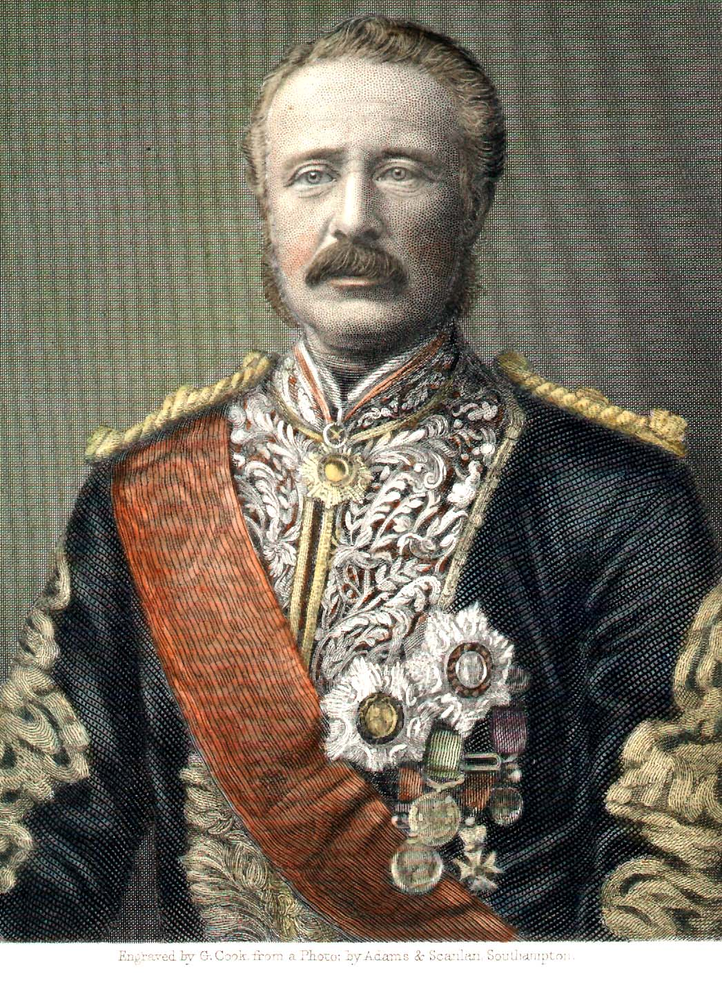 Gravyr av C.G. Cook